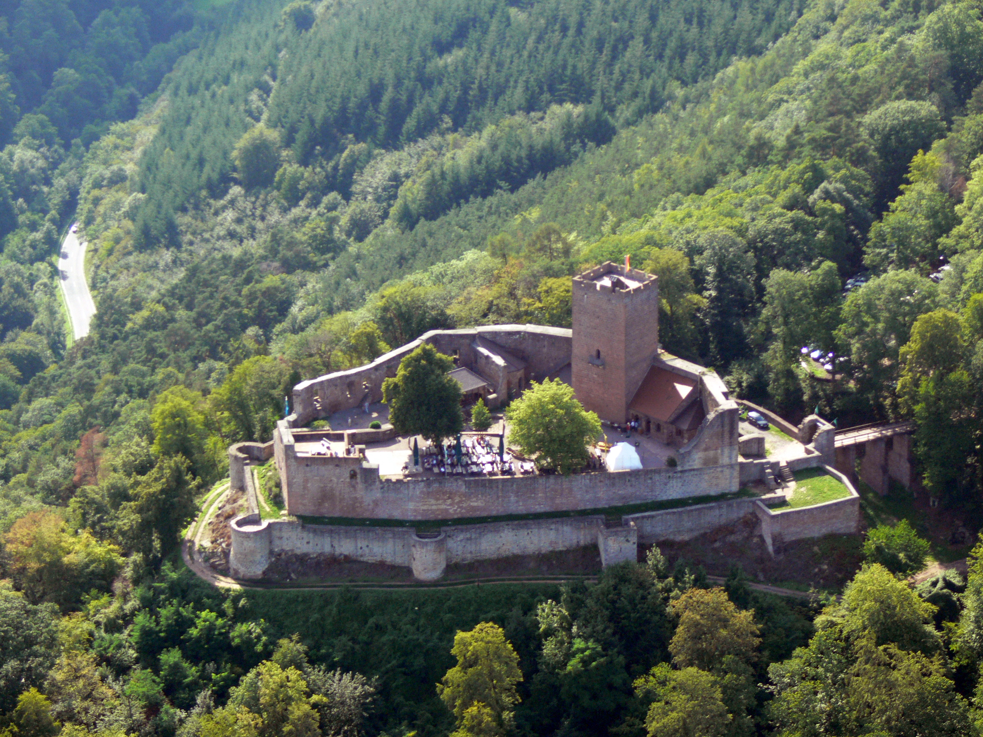 Burg Landeck